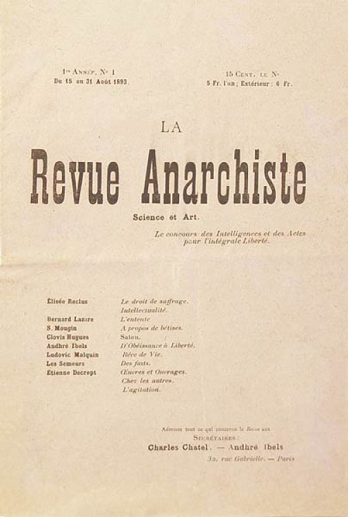 La Revue anarchiste (1893) - n°1 - 15 au 31 août 1893